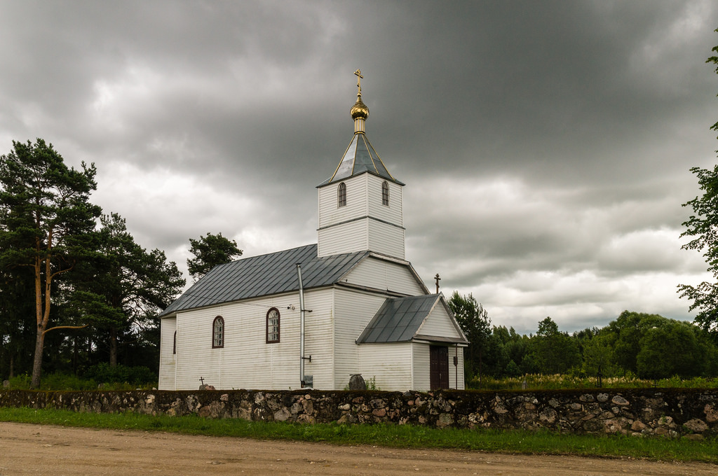 Кастыкі. Царква ў імя Святых Сарака Севасційскіх пакутнікаў